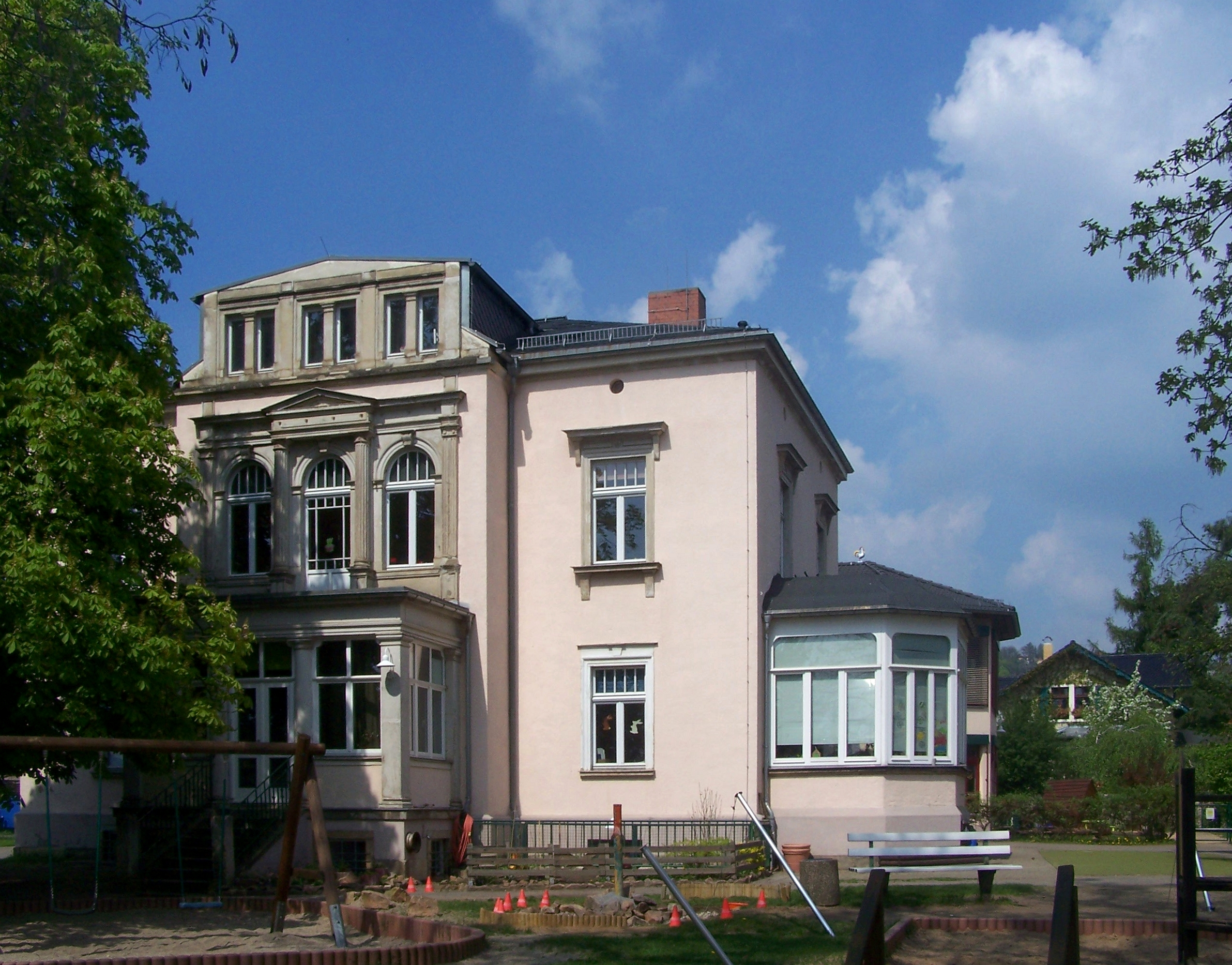 Gohliser Straße 8 in Radebeul, Kindertagesstätte "Zur Bimmelbahn"